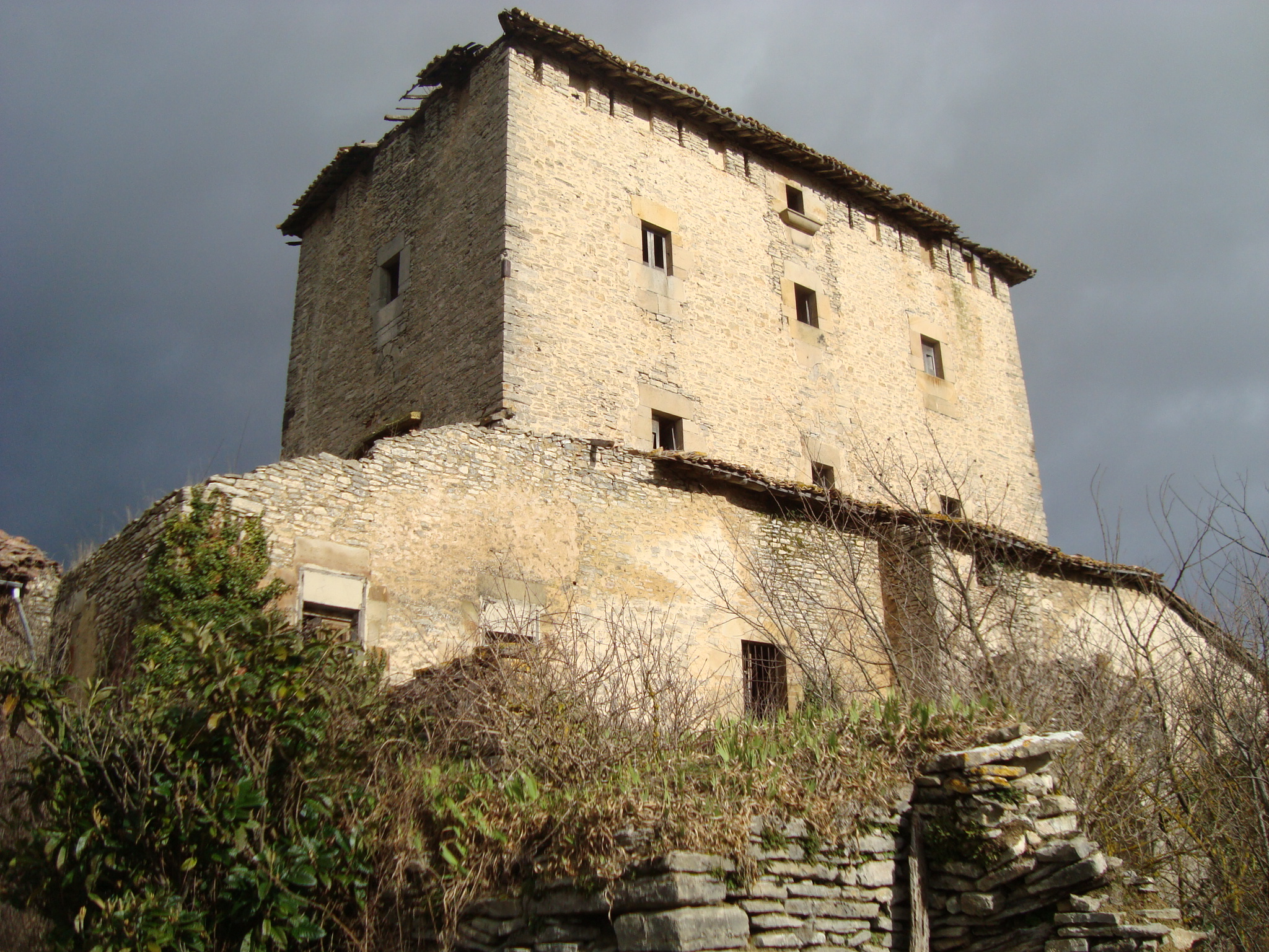 Martiodako dorretxearen ikuspegia (Gasteiz)